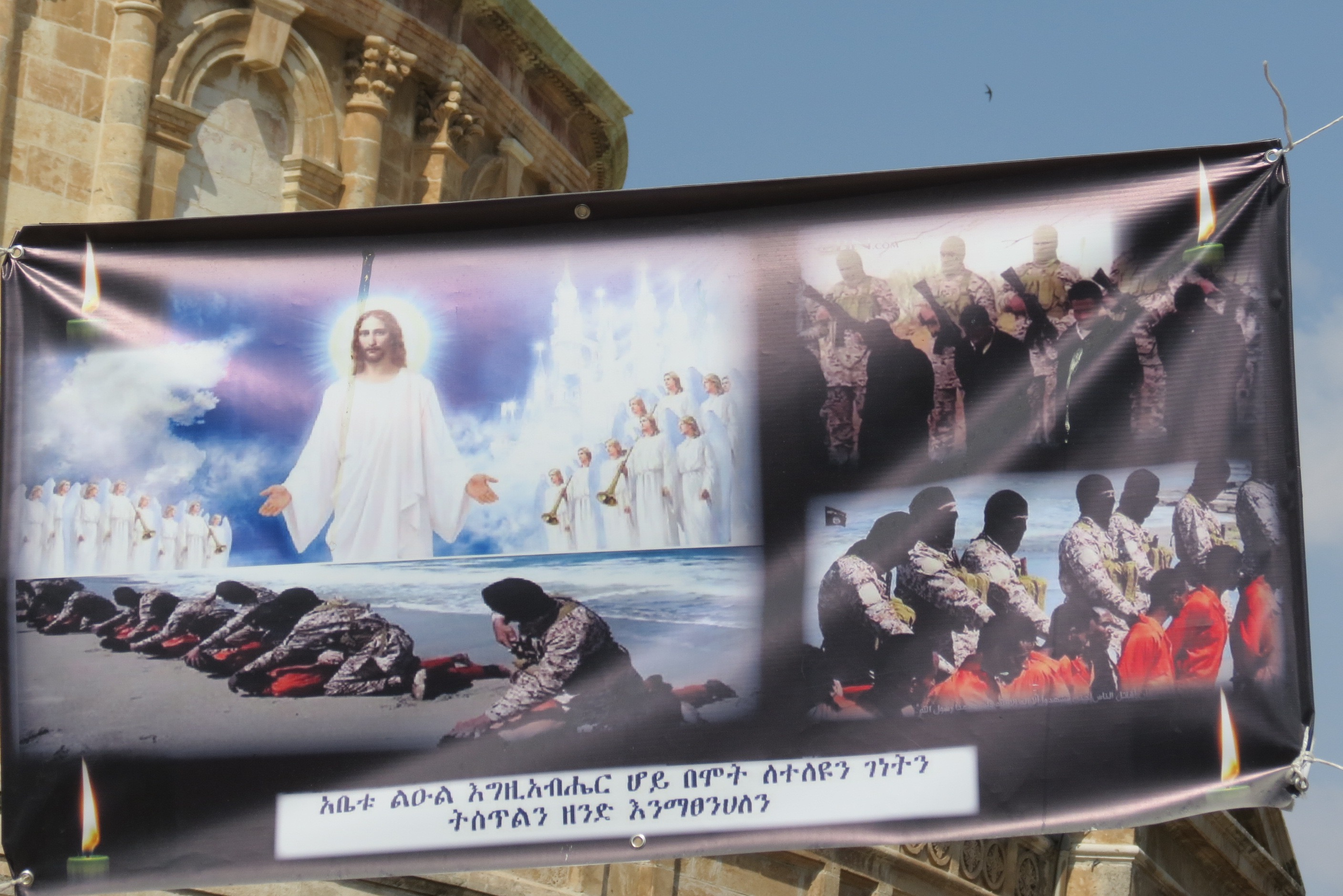 Kidane Mehret Church, Ethiopian Abyssinian Church, Jerusalem, Israel